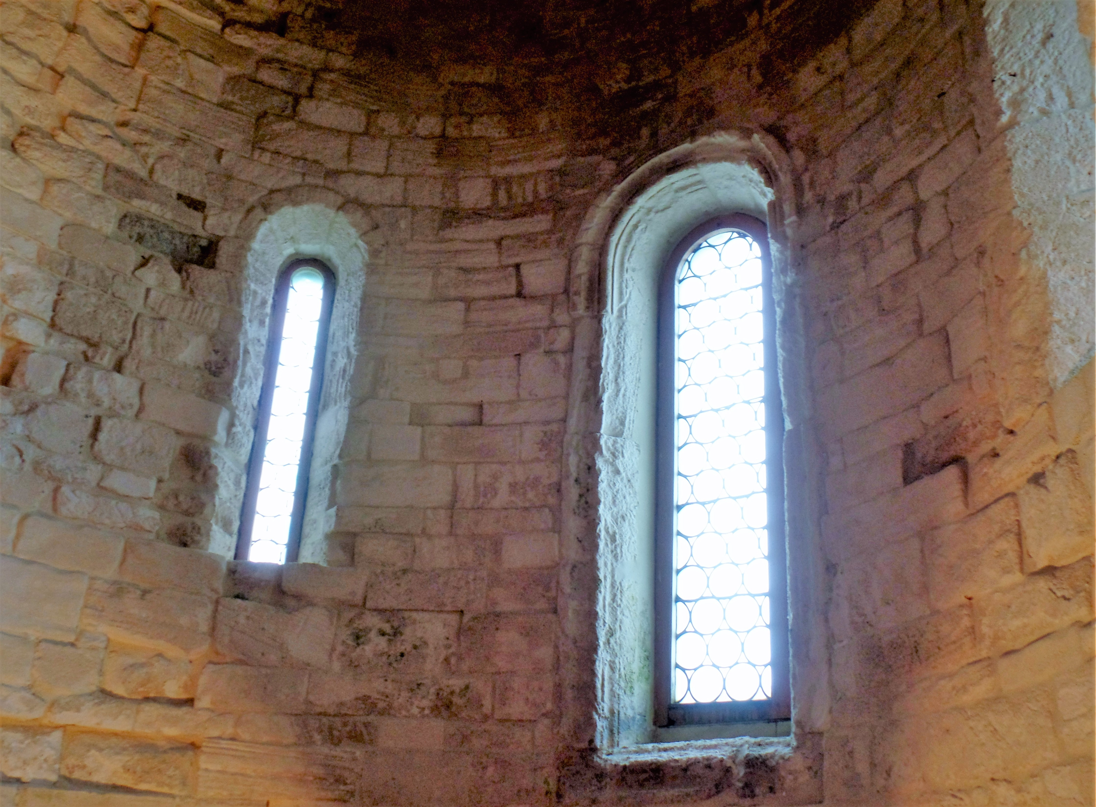 Chiesetta di Portonovo AN - finestre